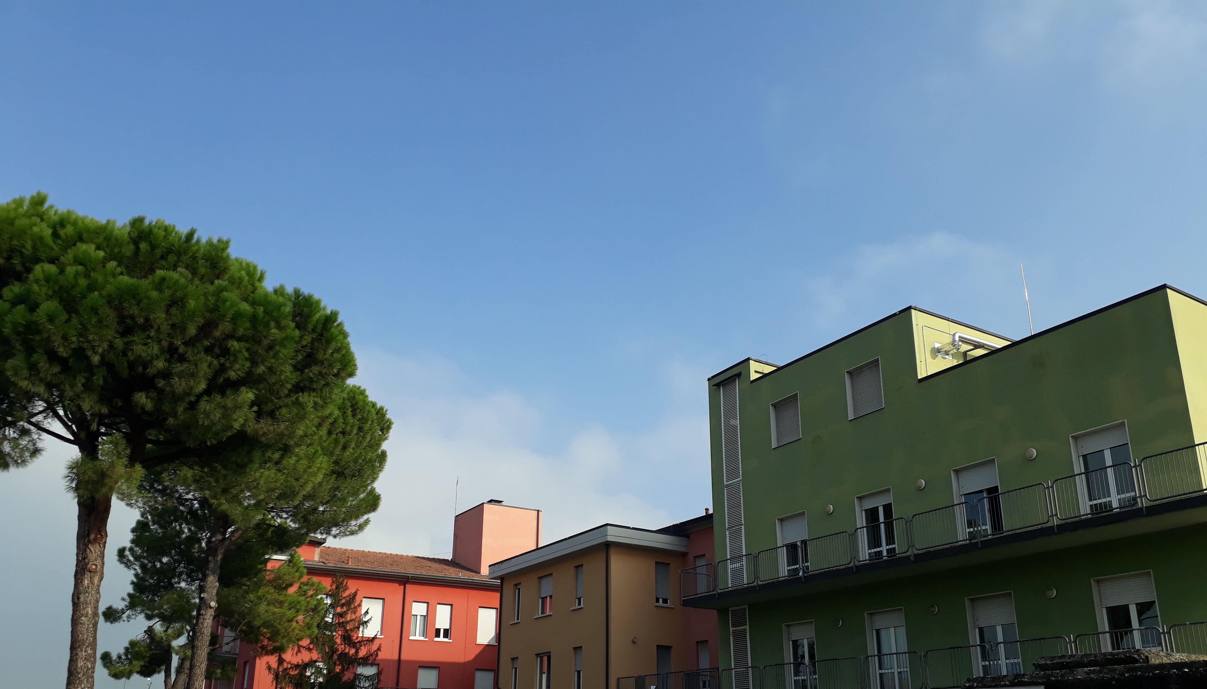 Istituto di ricovero e cura a carattere scientifico Castel Goffredo.